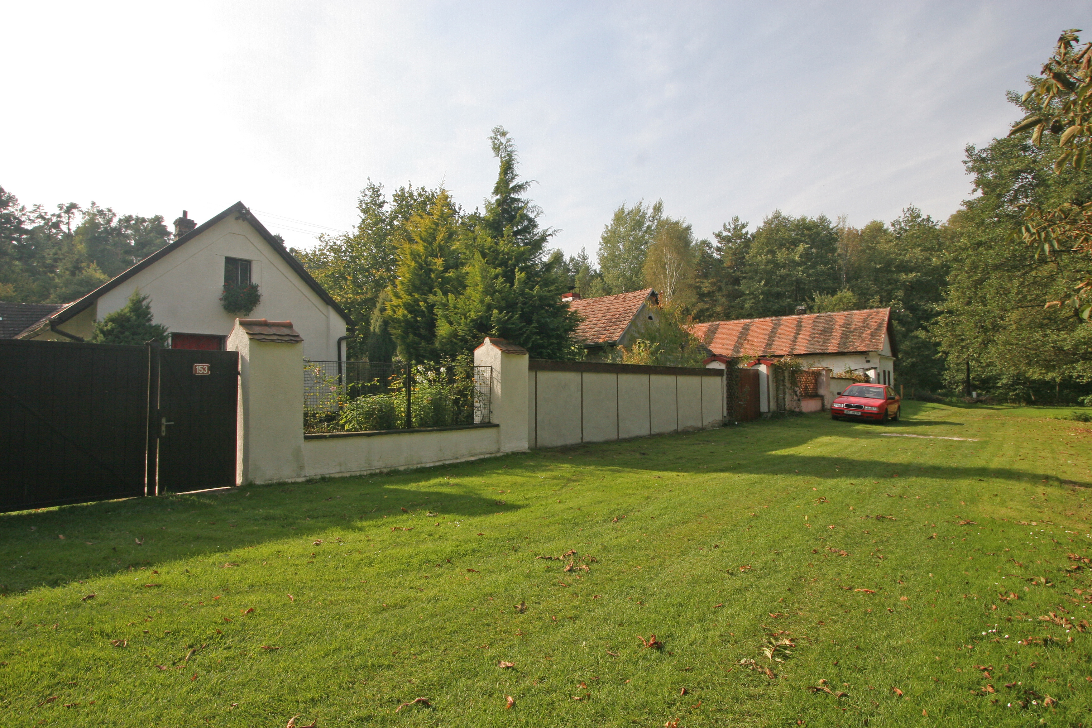 Zbraněves čp. 153